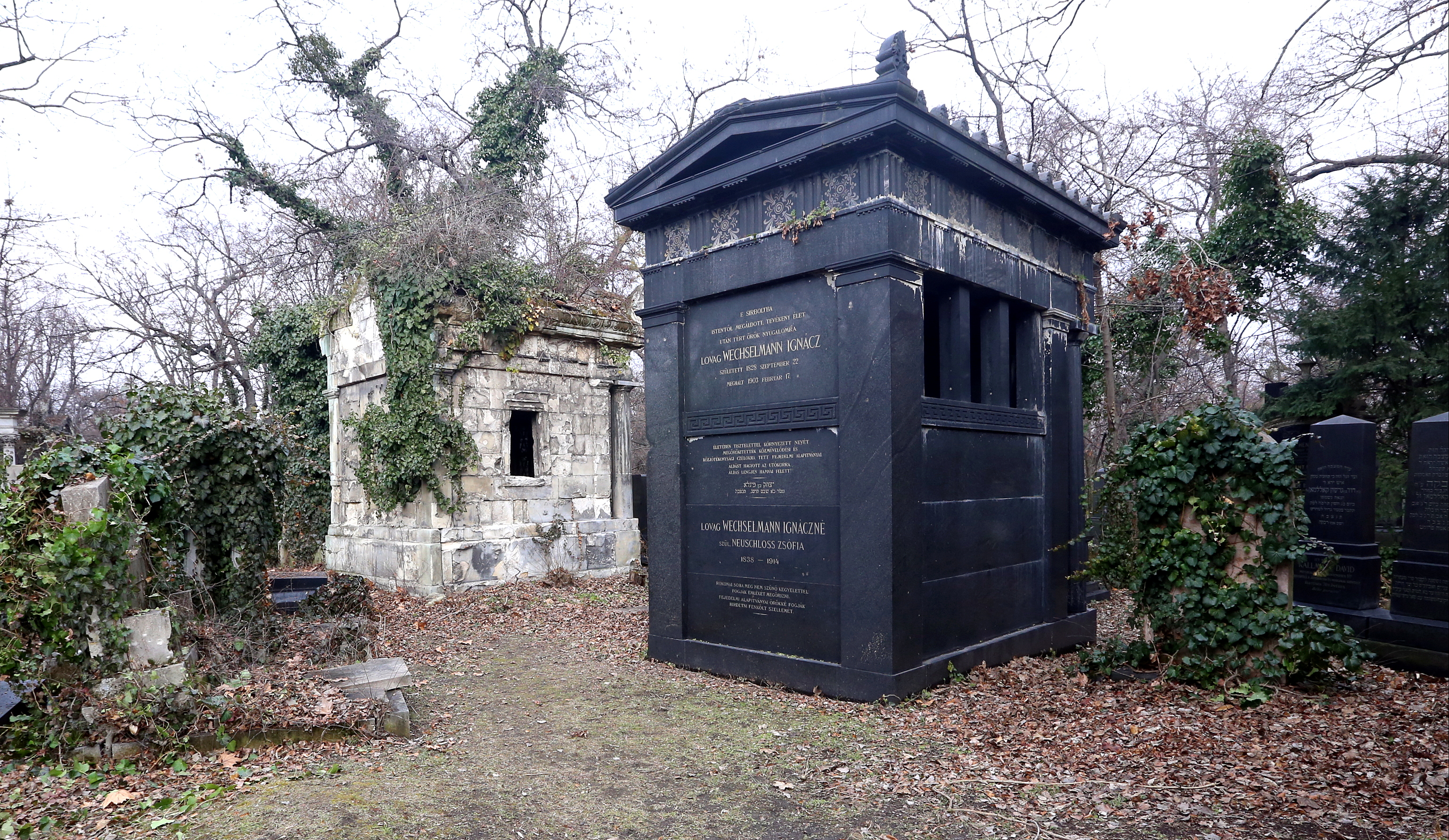 Wechselmann Ignác síremléke a Salgótarjáni Utcai Zsidó Temetőben